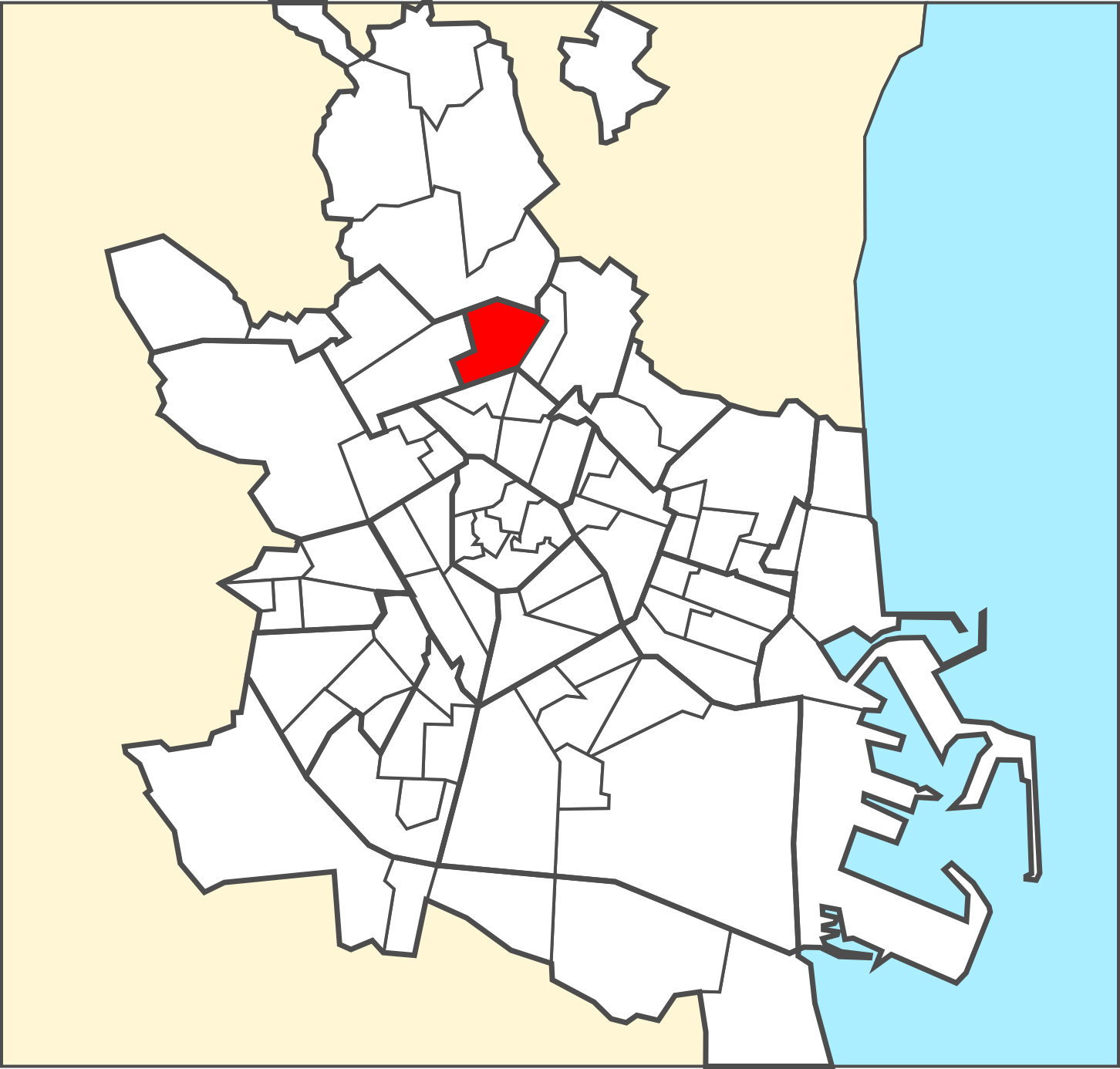 Localització del barri dins de la ciutat de València.